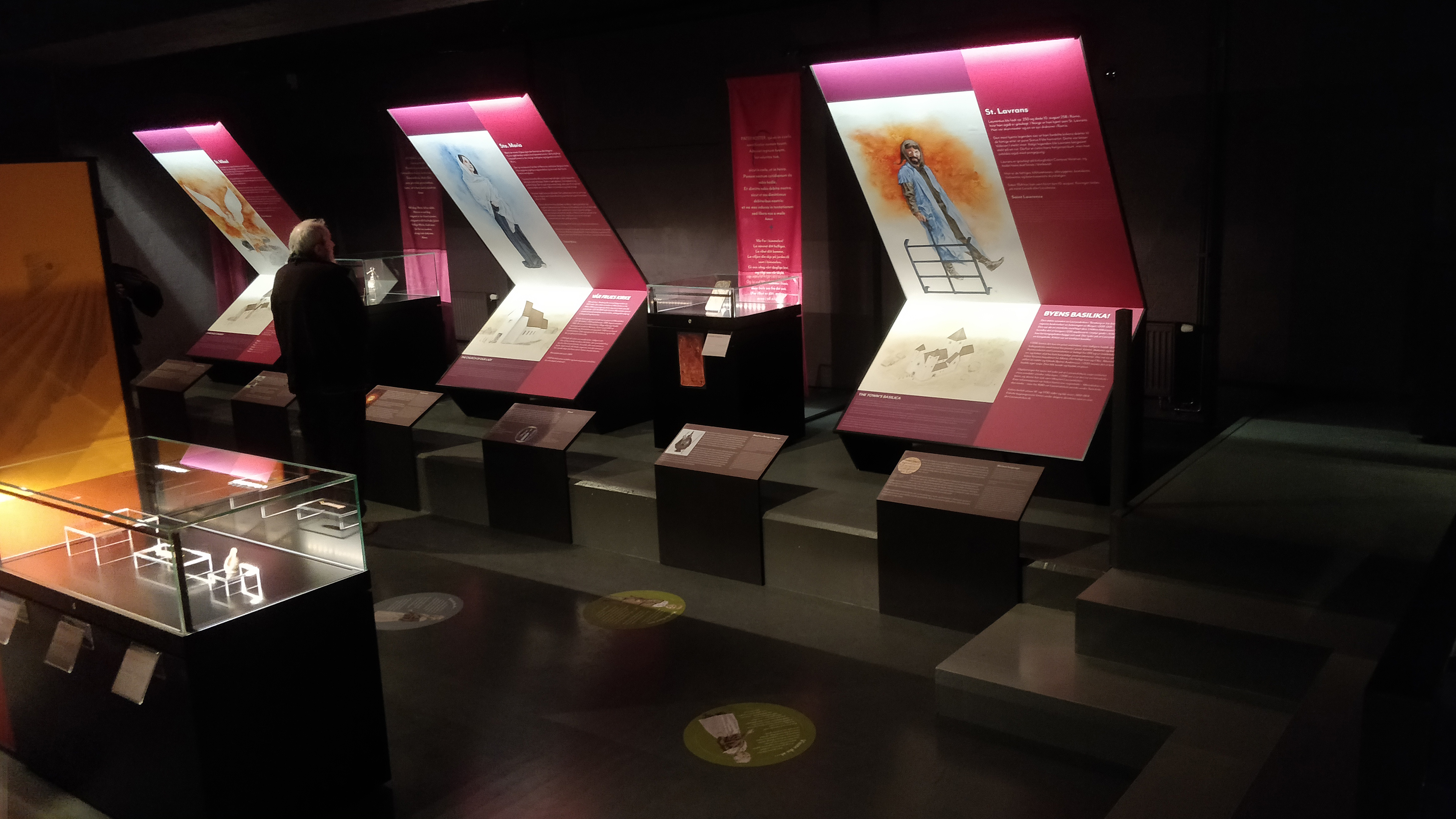 Fra utstillingen Lux - Tro og hellighet i middelalderen. Slottsfjellsmuseet, Tønsberg. 2019